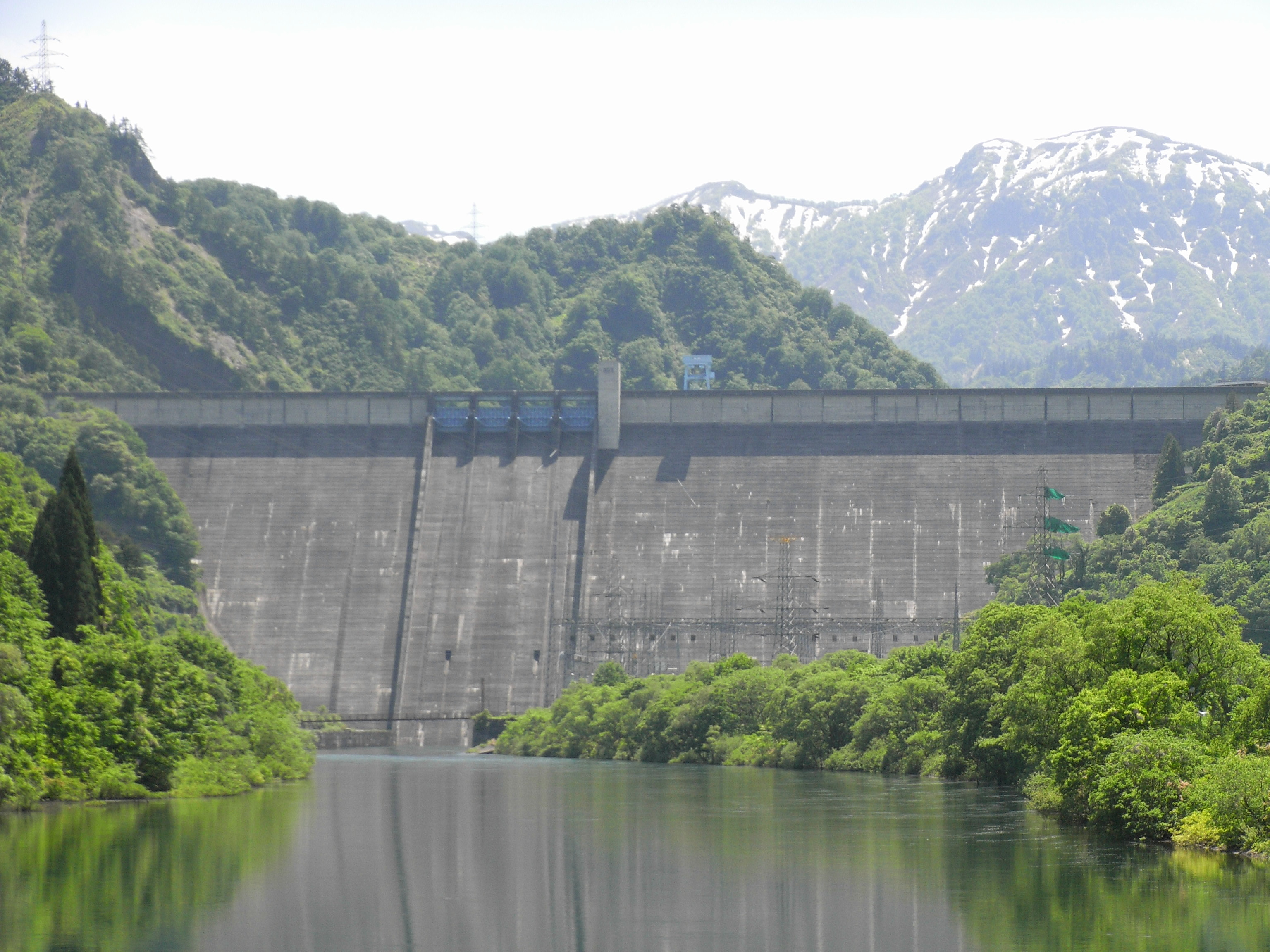 Dam